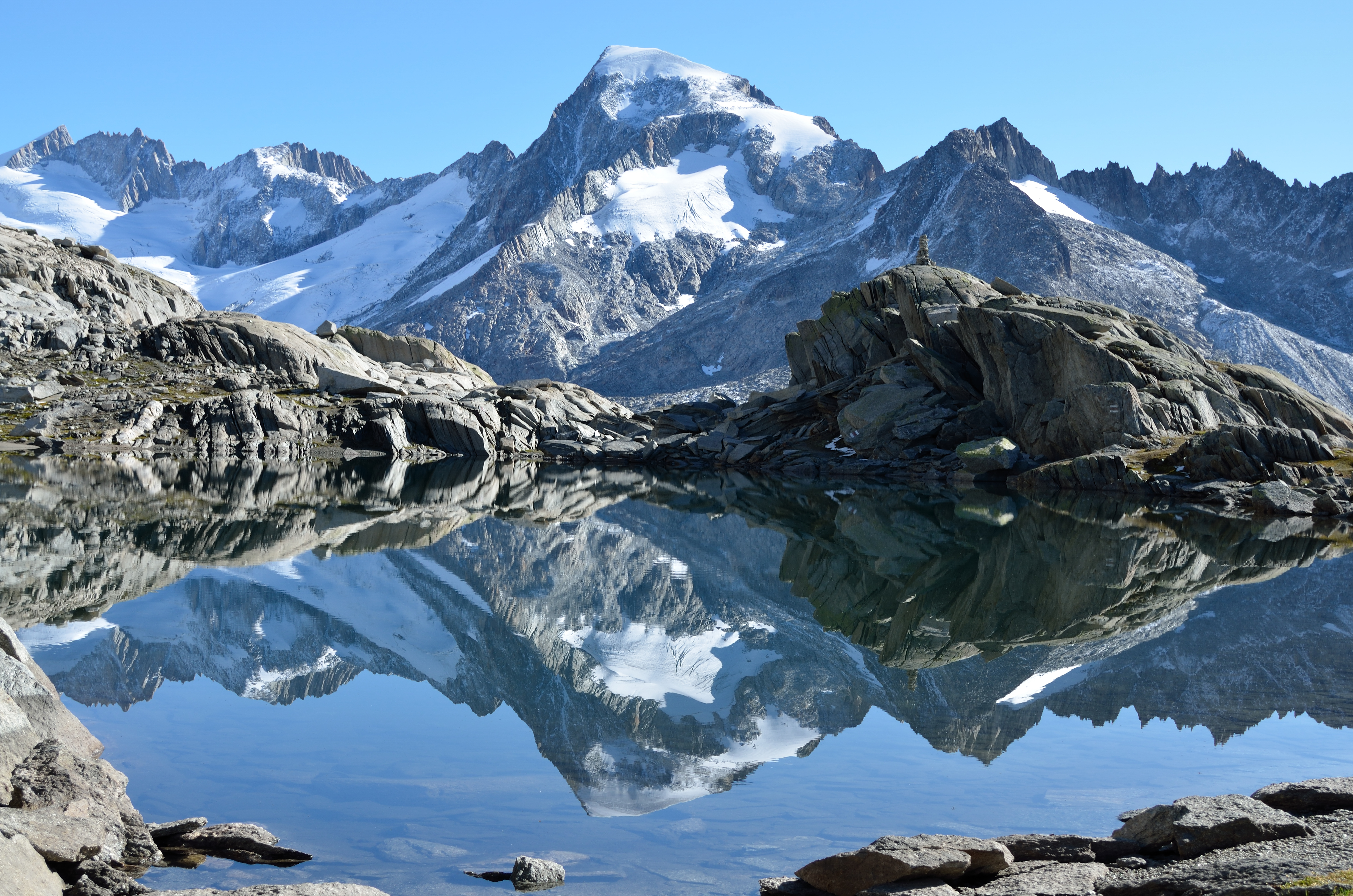 Galenstock from Grütlisee